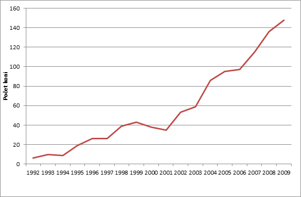 Vytvořeno na základě: Kůs, Evžen. Jedeme dál… Trojský koník, 2009, 11(1), s. 16–17., Kůs, Evžen. Bílé peklo v Gobi. Trojský koník. 2010, 12(2), s. 23.